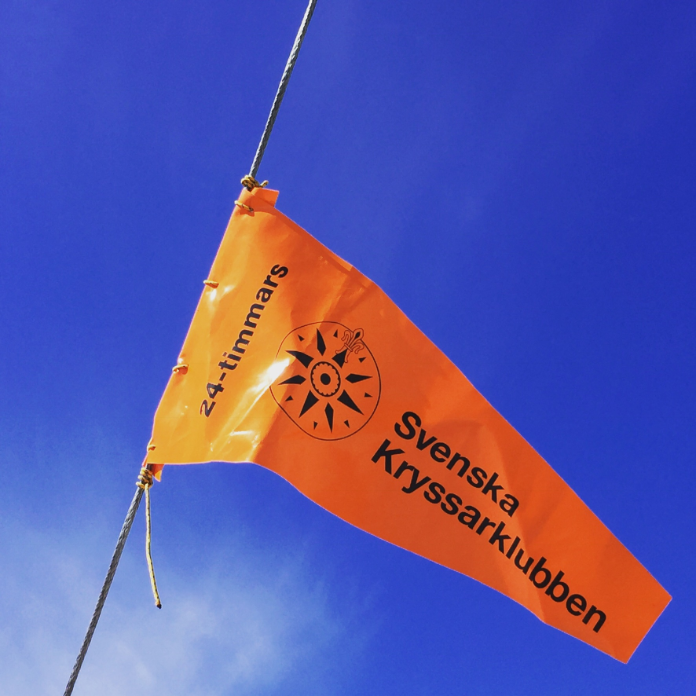 Deltagarvimpel för 24-timmarsseglingar. Alla deltagare som seglar någon form av 24-timmarssegling ska föra denna i akterstag eller motsvarande.